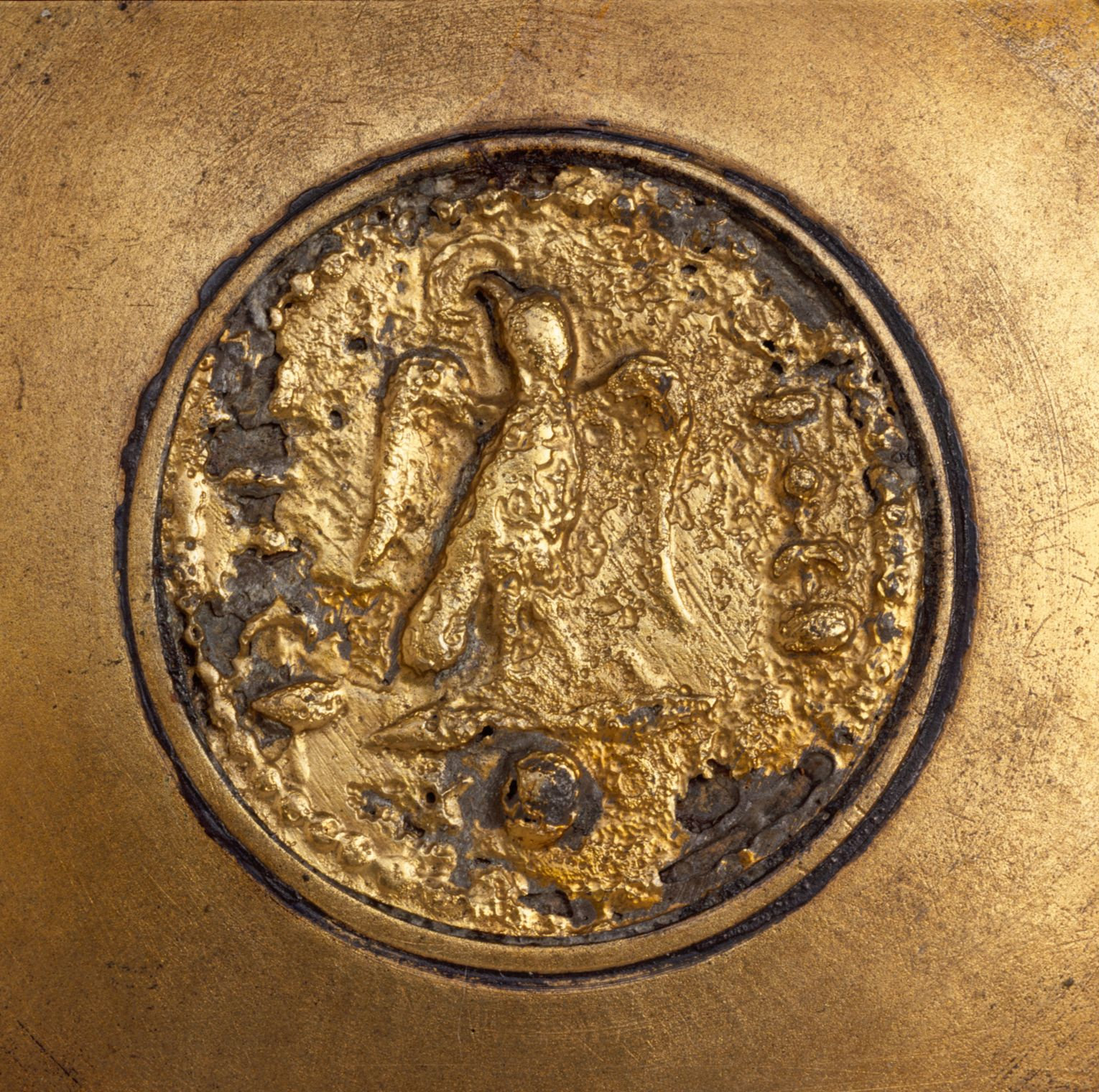 Balteus-beslag af forgyldt bronze m. ørn Fra Vimose, Næsbyhoved-Broby sogn. Yng. rom. jern.